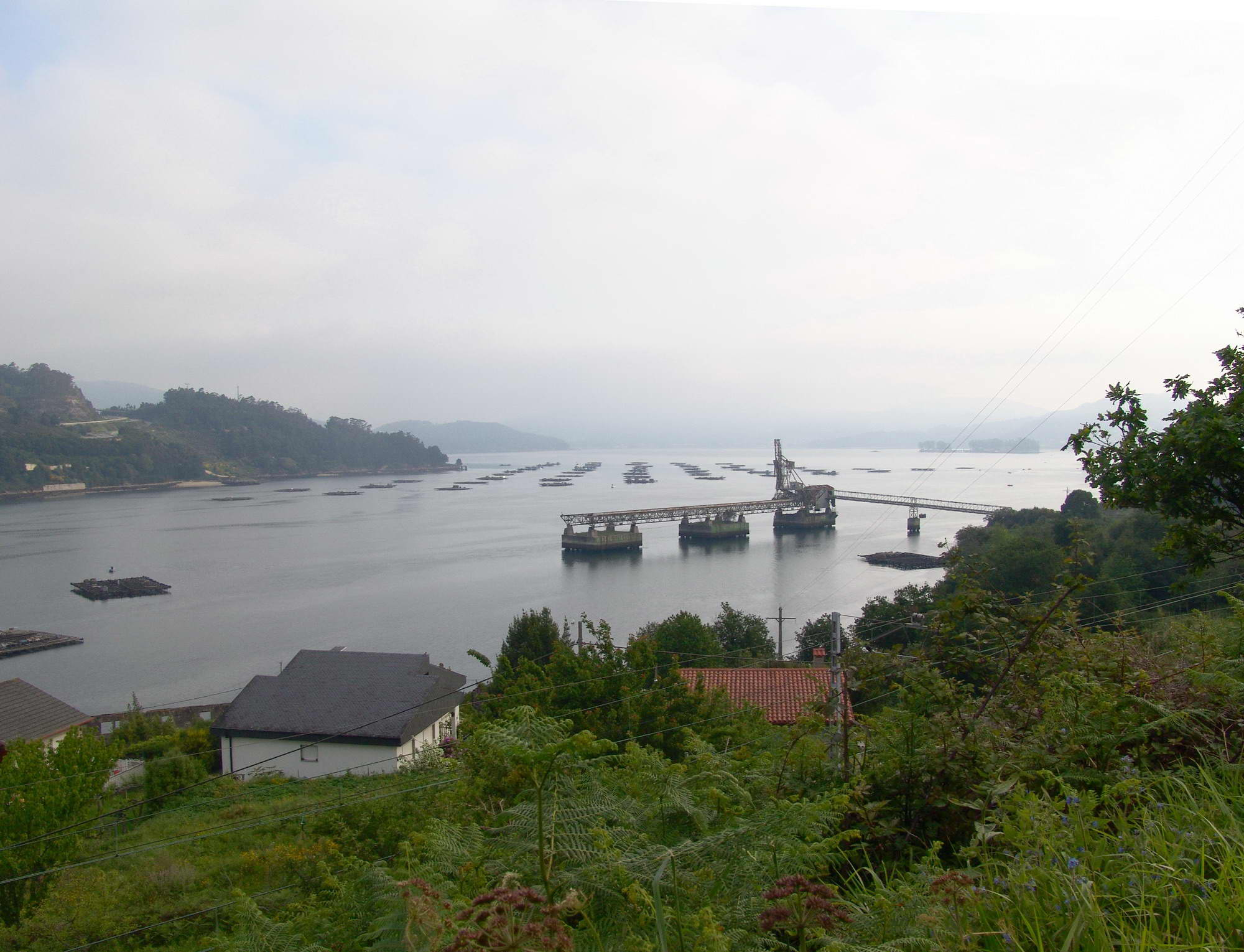 Embarcadoiro de mineral en Rande (Redondela, na Ría de Vigo. Ao fondo á dereita, a illa de San Simón. Publish by= Luis Miguel Bugallo Sánchez.